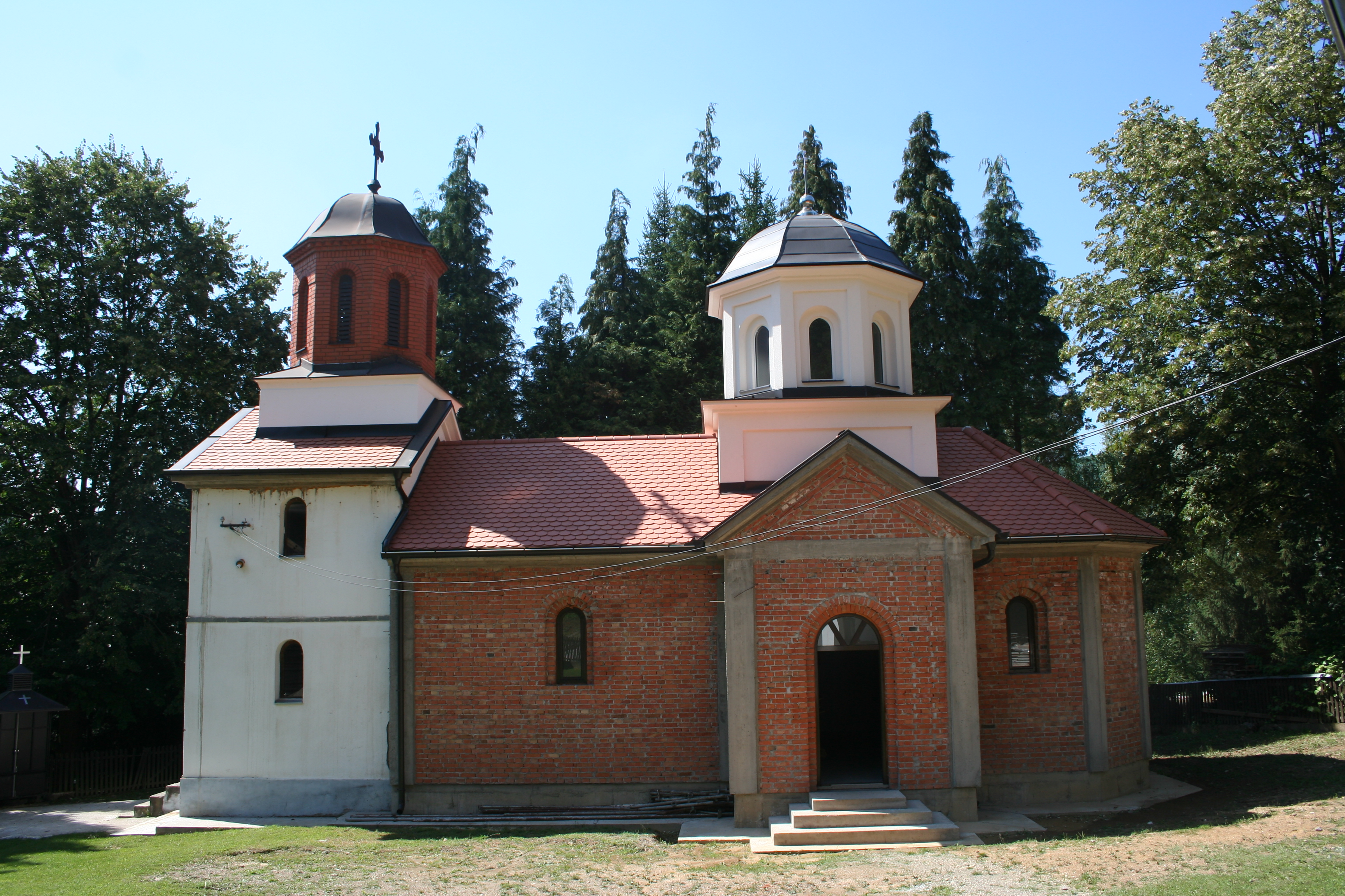 Crkva Usekovanja glave Sv. Jovana Krstitelja, Dvorska